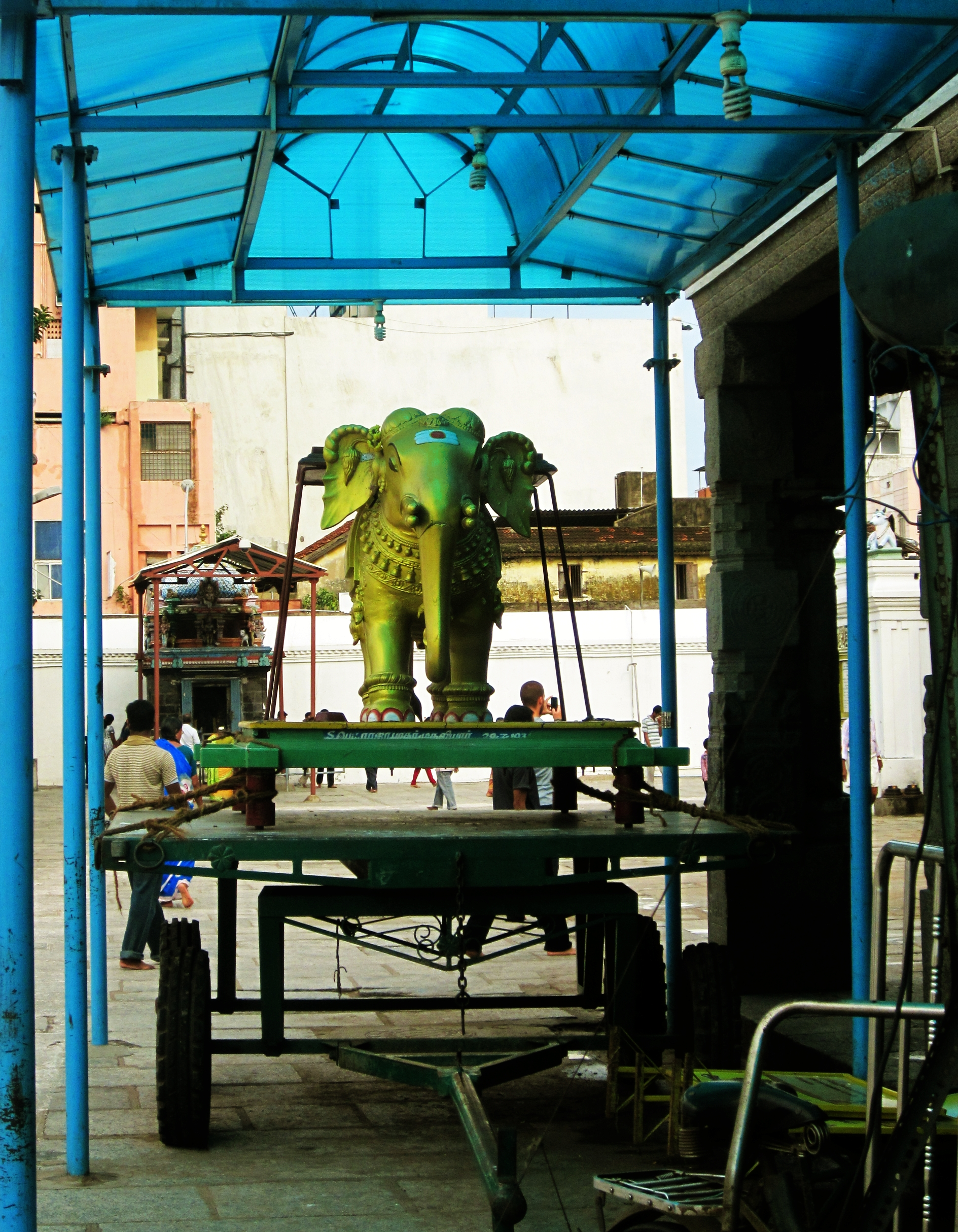 திருவிழா சமயங்களில் உற்சவரை வைத்து அழைத்துச்செல்லும் வாகனம்